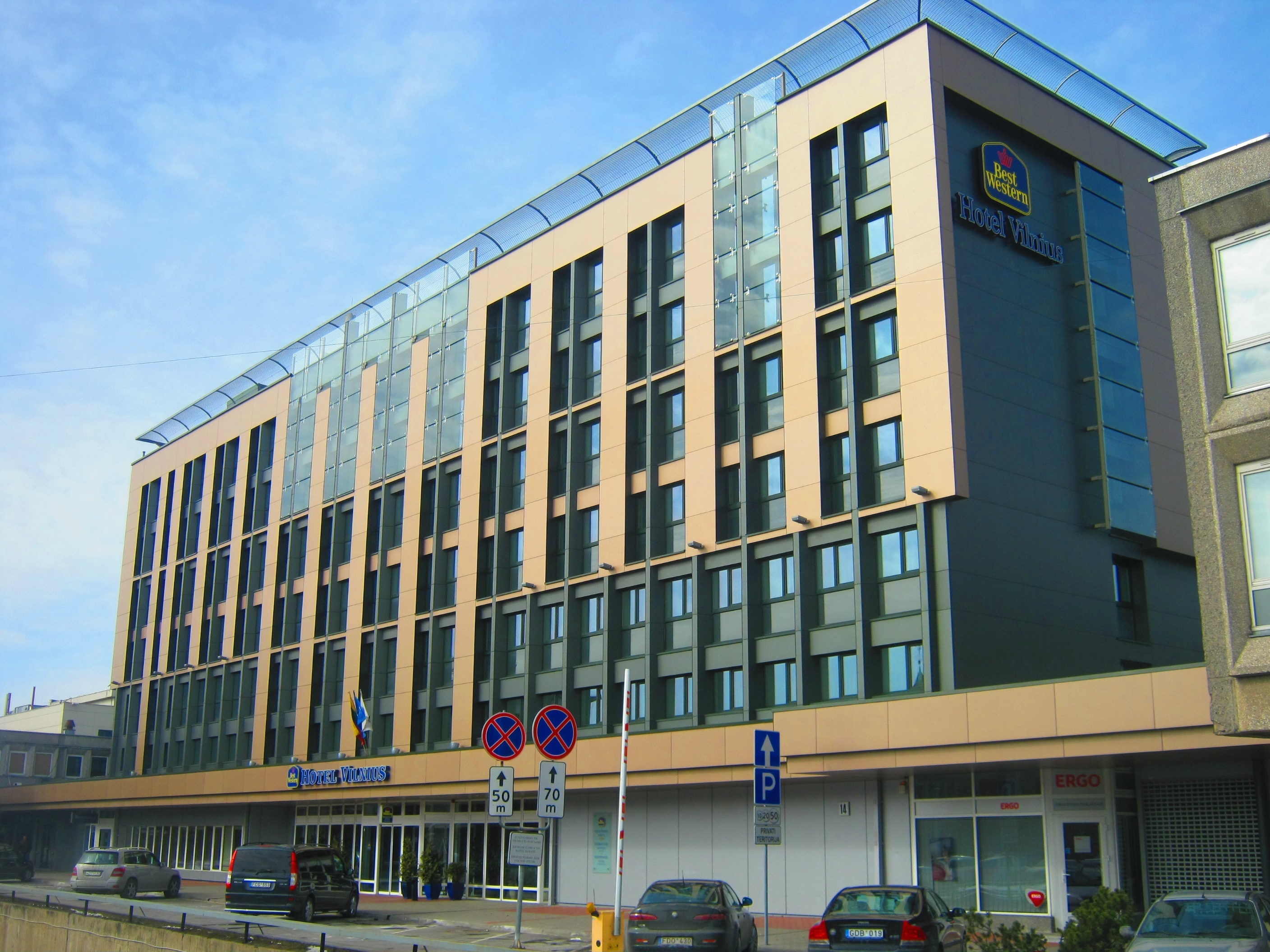 Vilnius